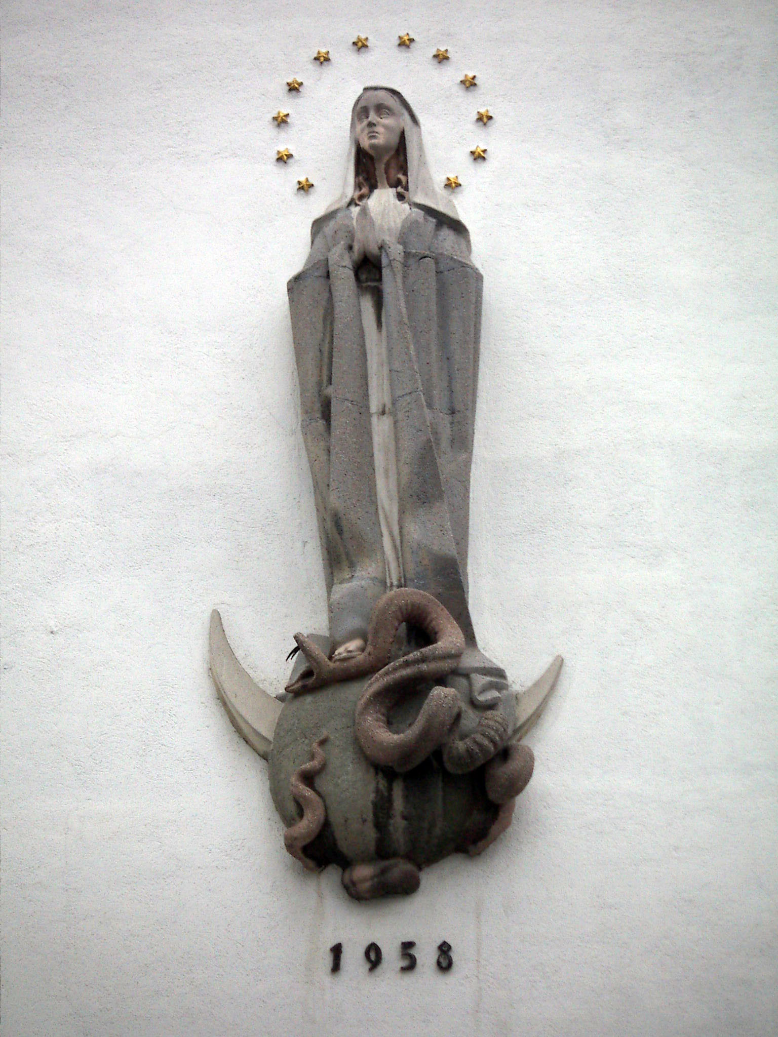 Muttergottesstatue der unbefleckten Empfängnis am Klostergebäude Töllergasse 13, Bildhauer Karl Nieschlag, im Jahre 1957 angebracht.